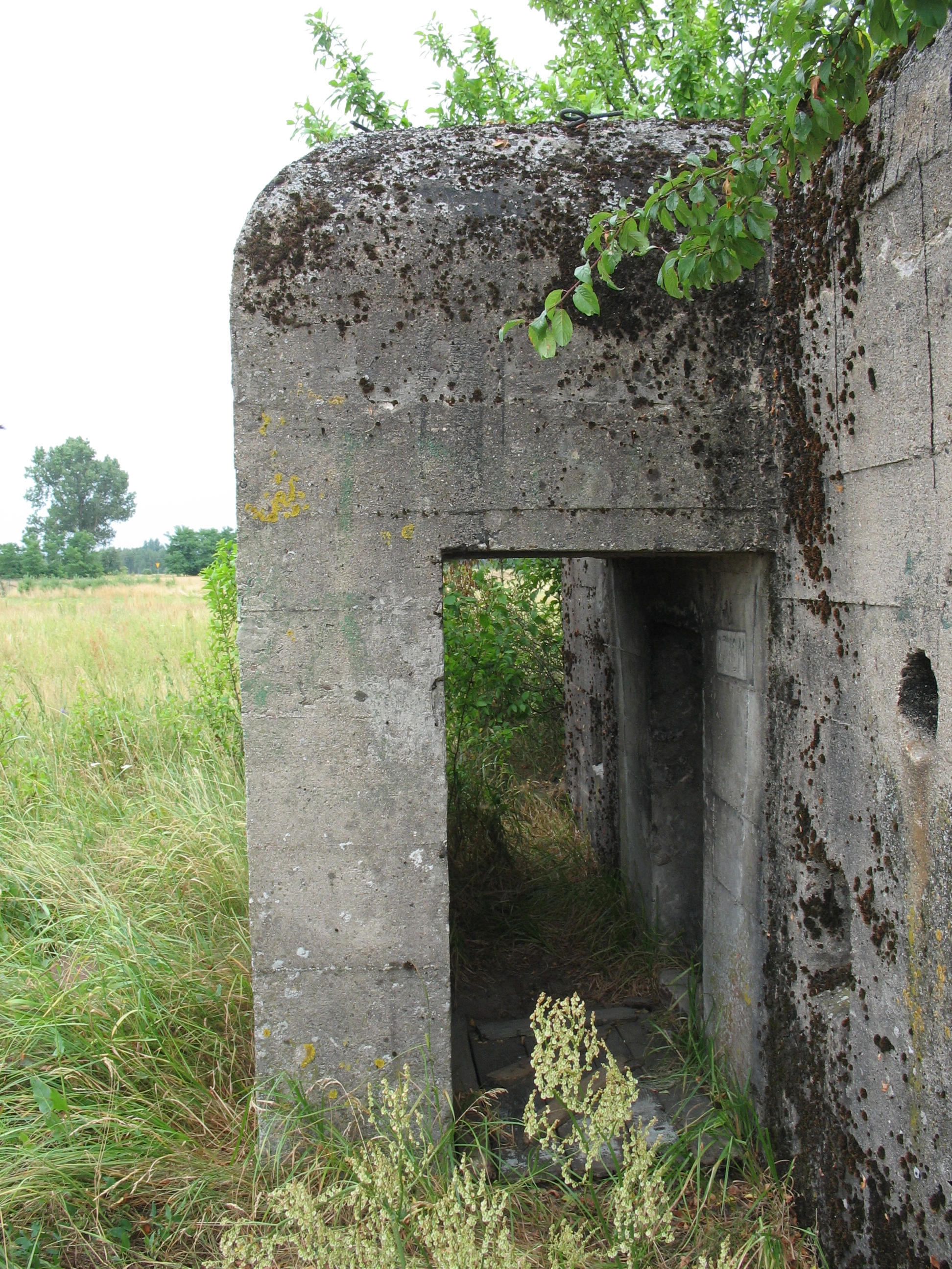 Schrony Armii Łódź (widoczna przelotnia) - Lubiec.